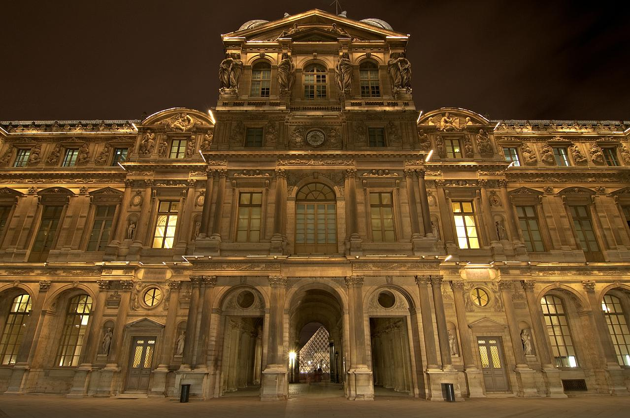 Palais du Louvre